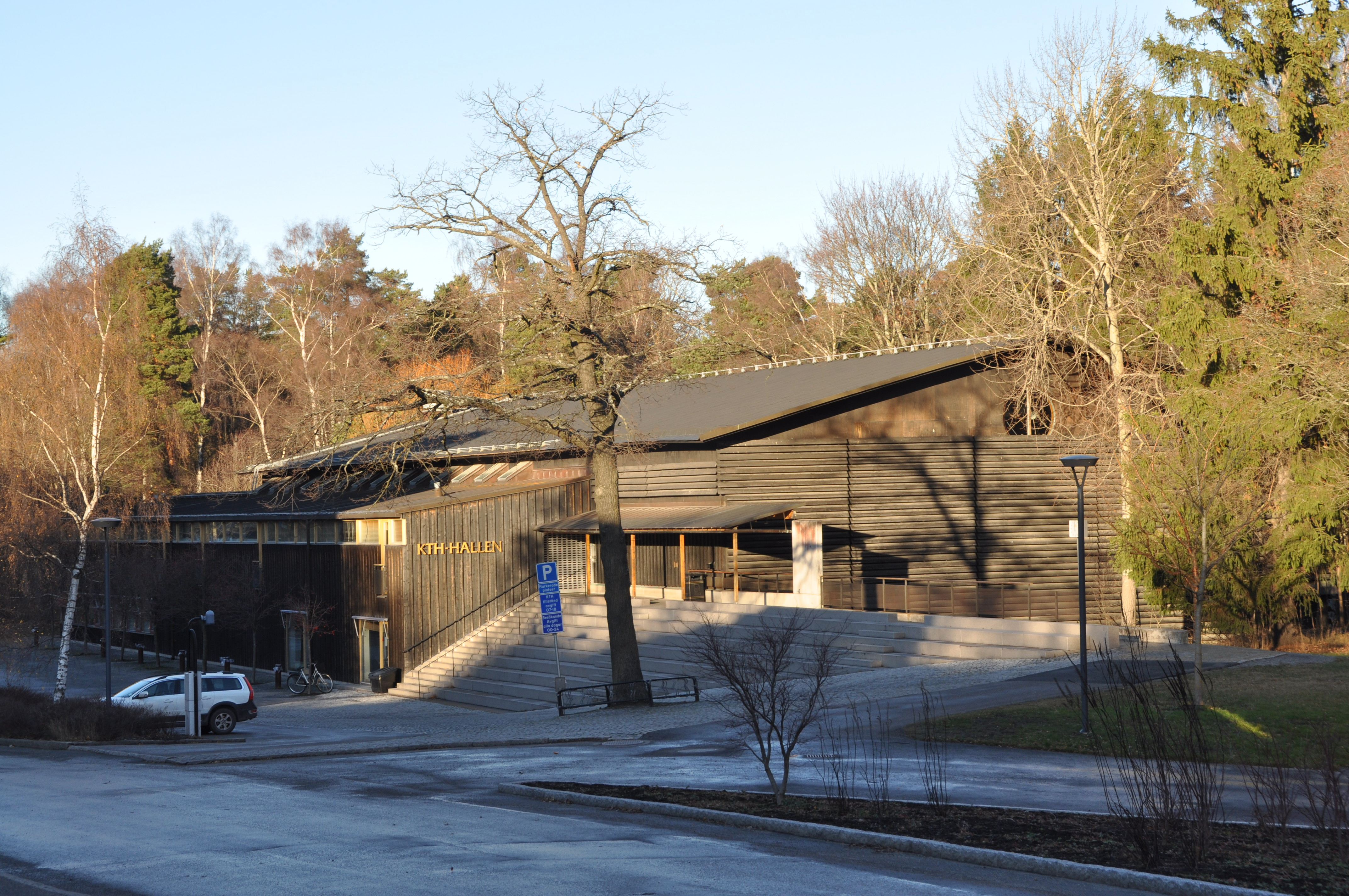 KTH-hallen, Brinellvägen 38-40 Byggnadsår 1993